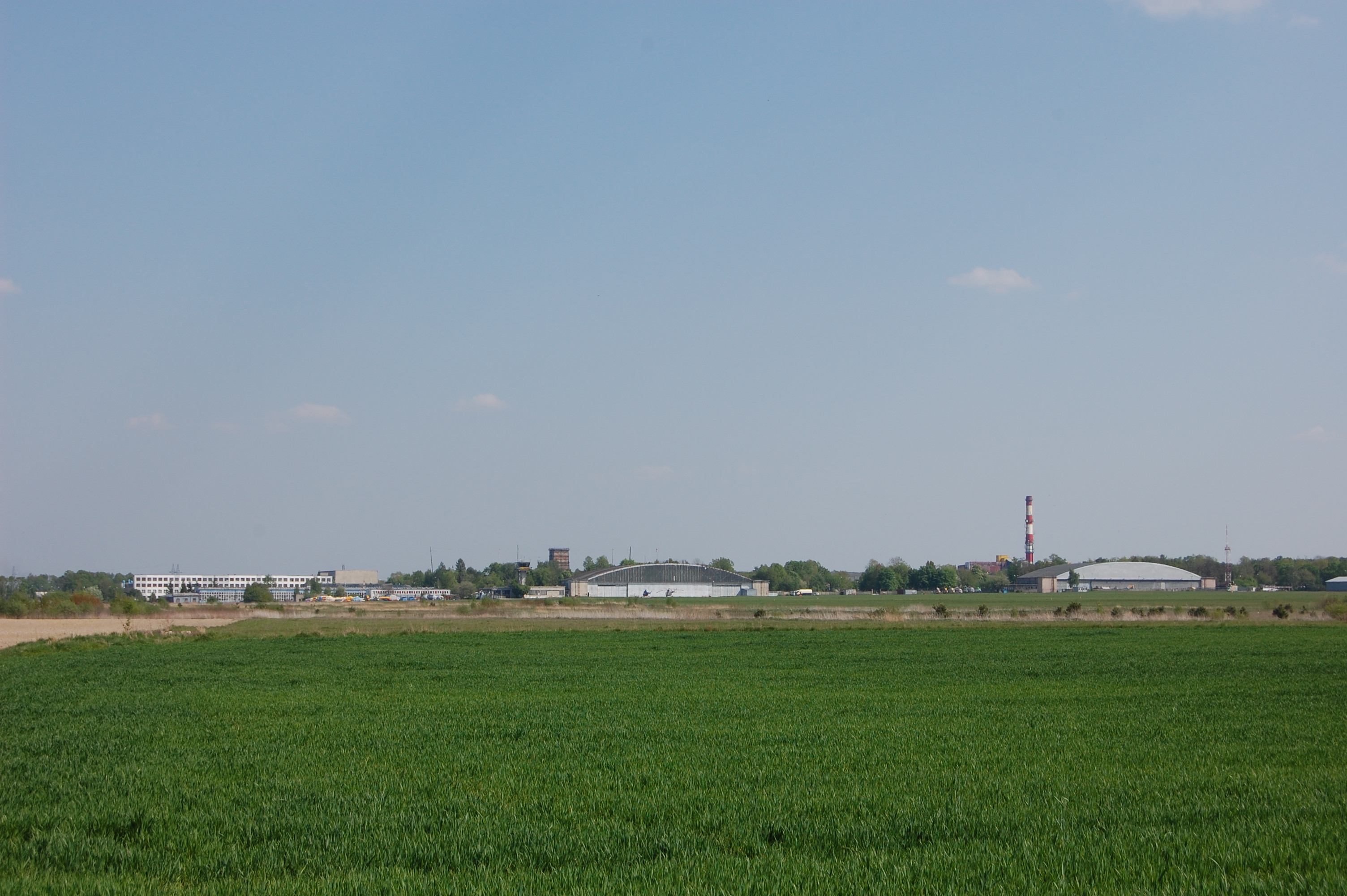 Lotnisko Świdnik (kod ICAO: EPSW)